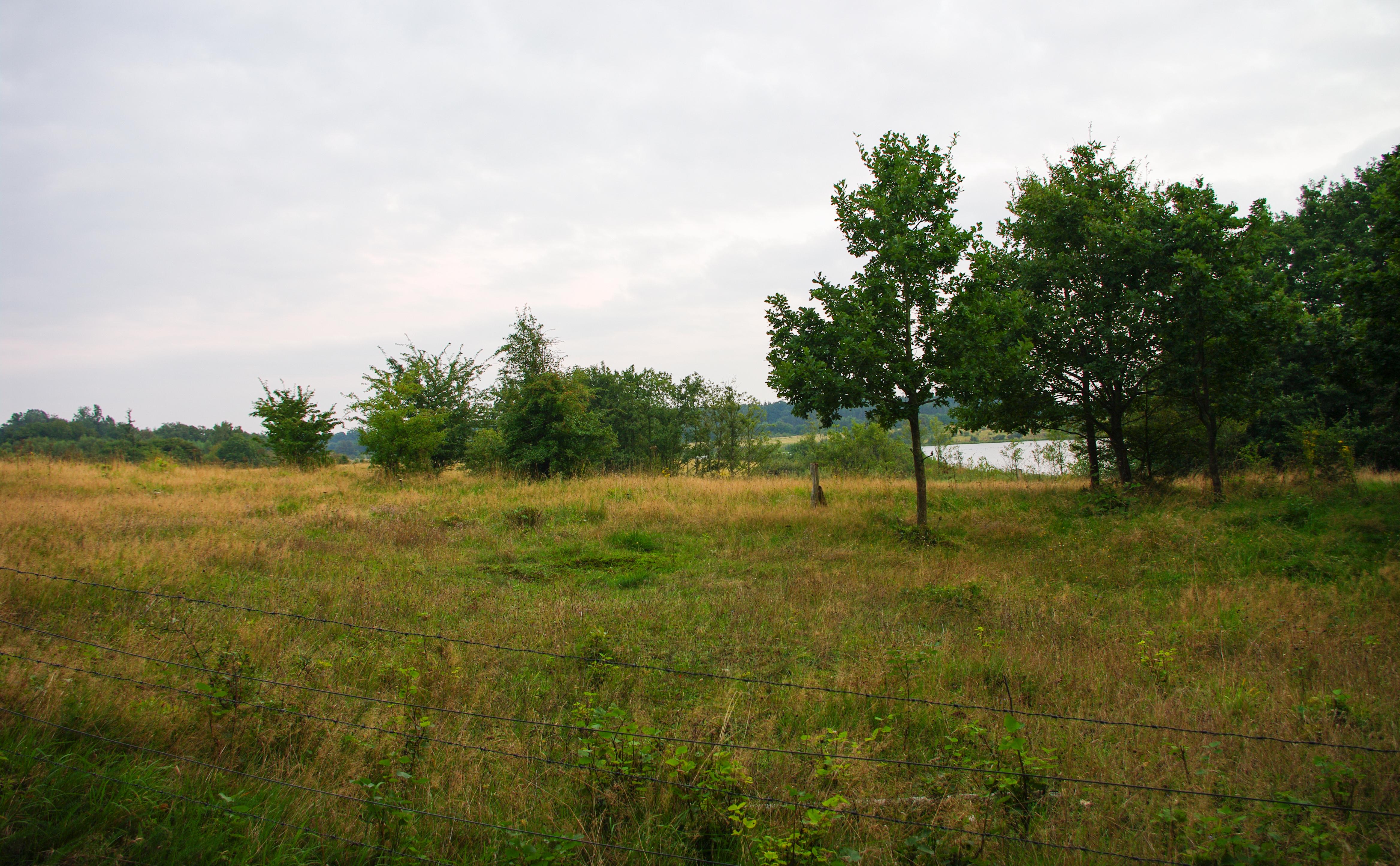 Naturschutzgebiet „Bültsee und Umgebung“: Die Wasserfläche des Bültsees von Westen gesehen